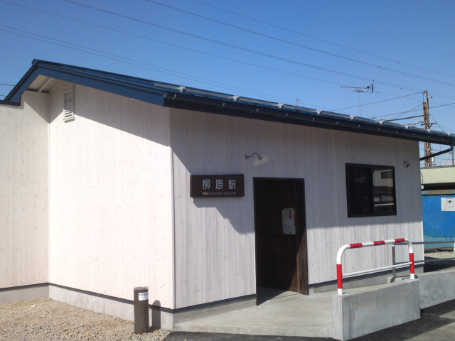 長野電鉄柳原駅（新駅舎）